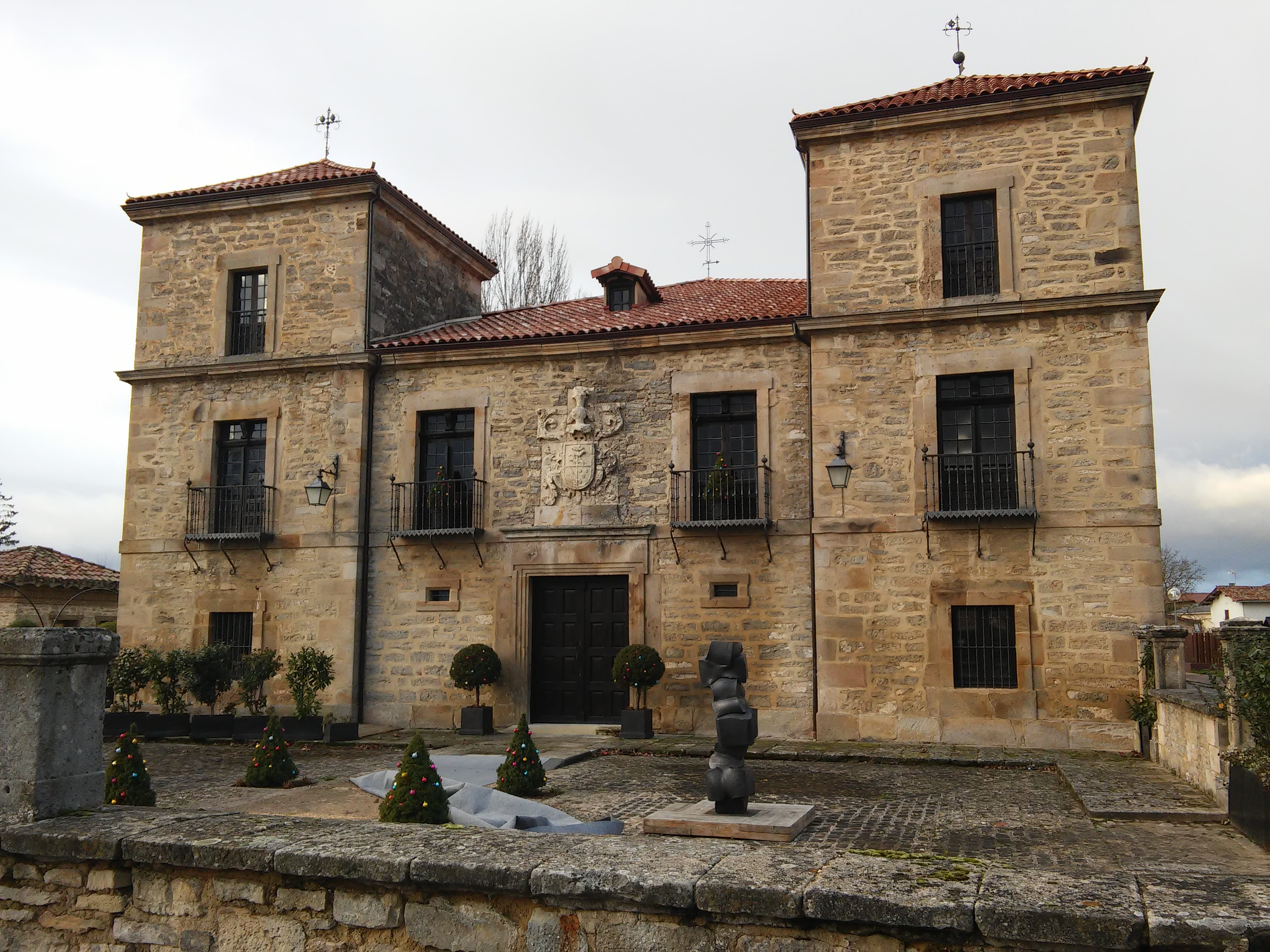 Zurbaoko Otaola Gebara jauregia